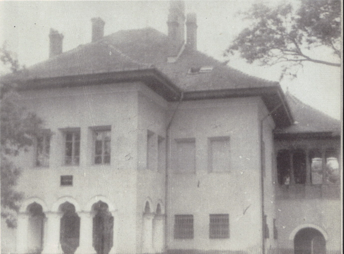 Palatul familiei Cantacuzino-Pașcanu (Conacul N. Rosetti-Roznovanu) din Pașcani. Fotografie executată după un clișeu existent la Muzeul de literatură al Moldovei din Iași. The palace was built around 1650 and reconstructed in the 18th century.